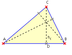 Darstellung zur Verdeutlichung des Höhenschnittpunkts bei Dreiecken